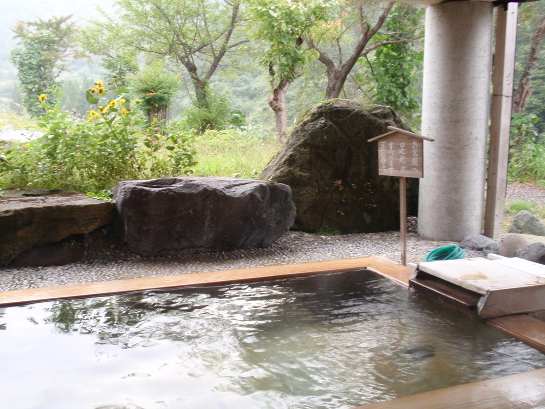 新潟県糸魚川市焼山温泉